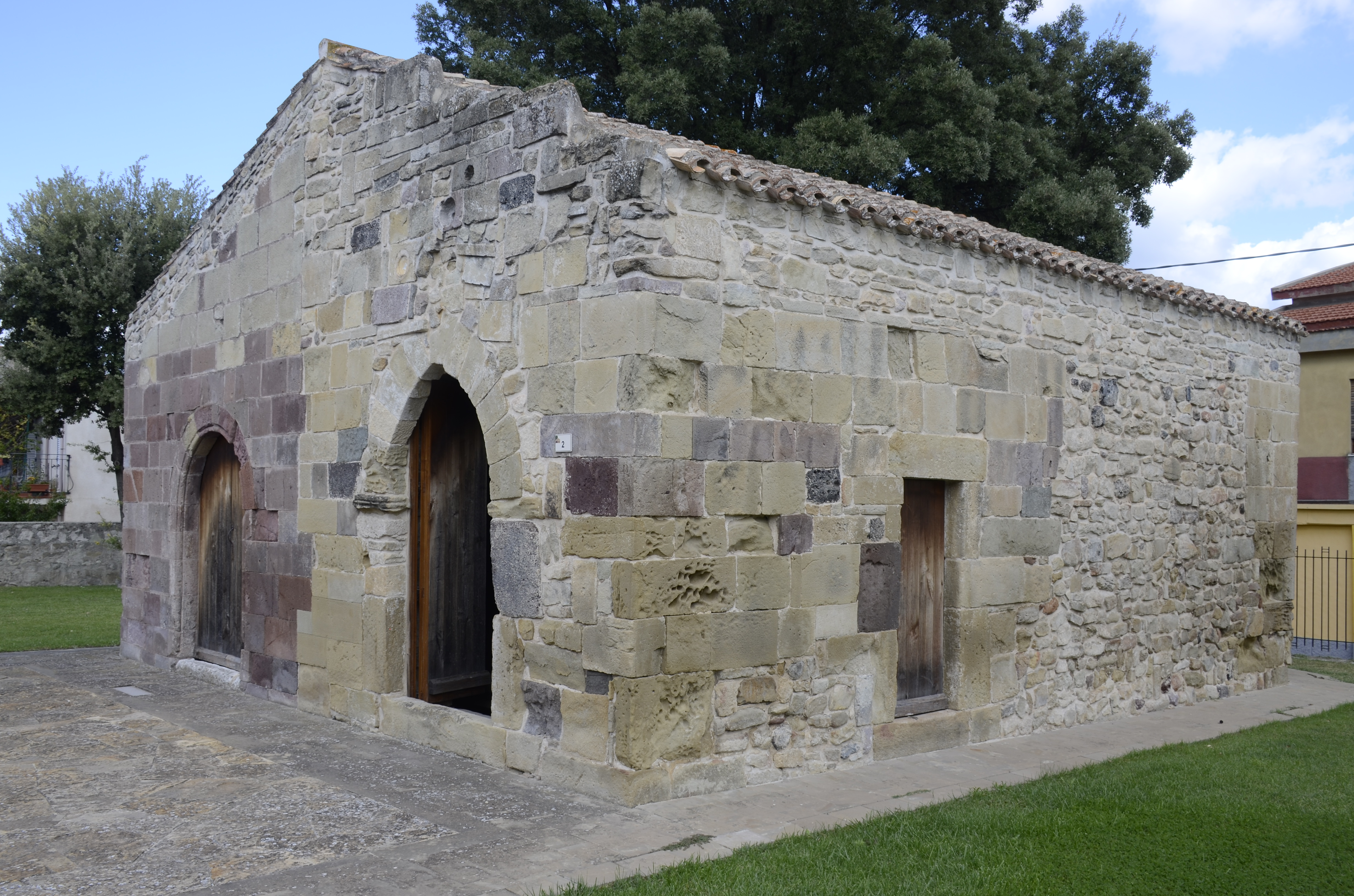 San Giovanni Batista, Barumini, Sardinien